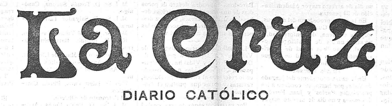 Capçalera de La Cruz